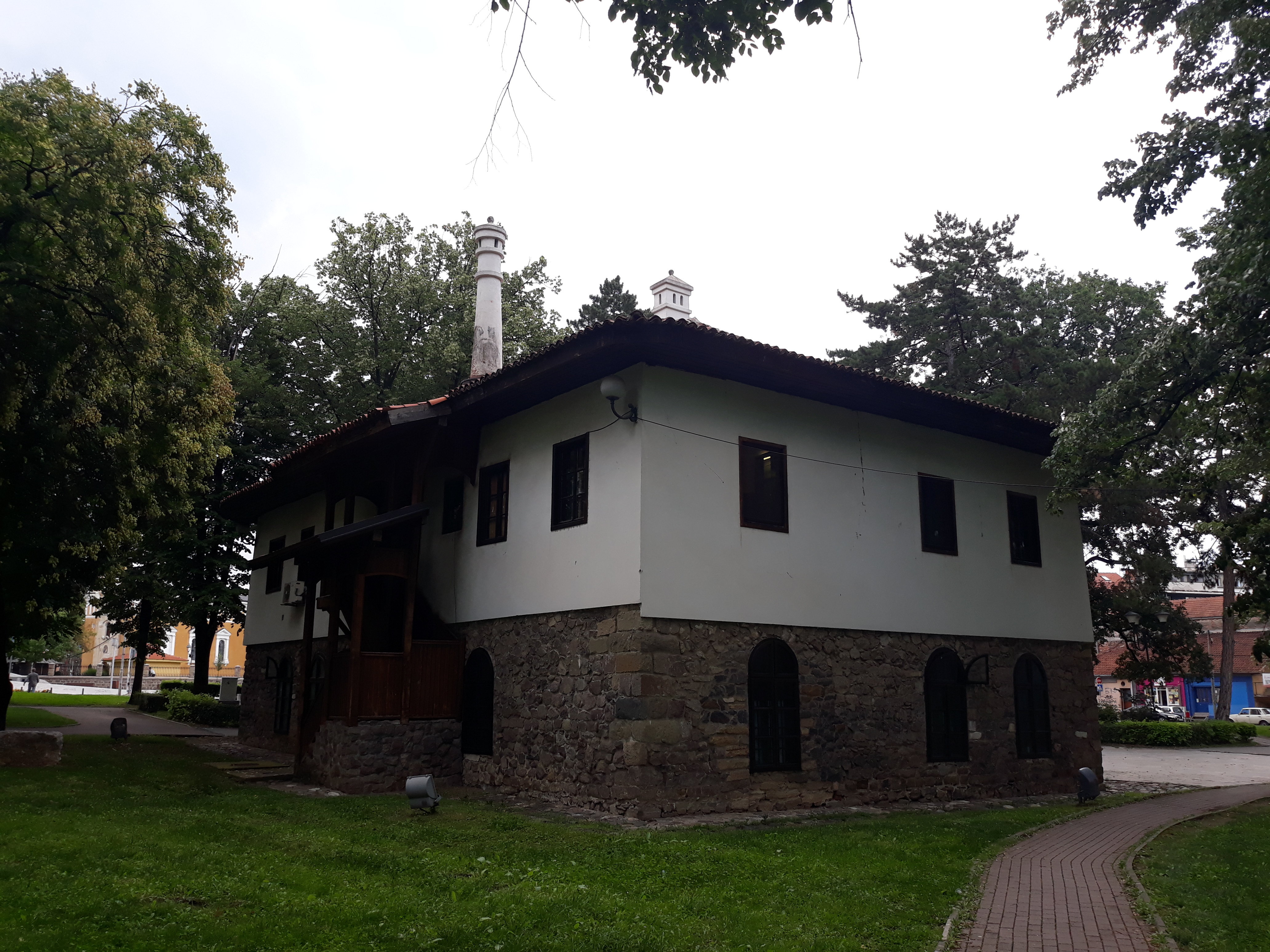 Господар Васин конак у Краљеву